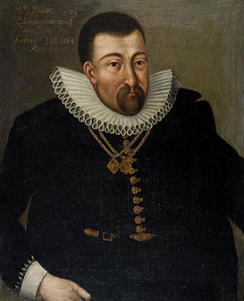 Portret George Gustaaf van Palts-Veldenz